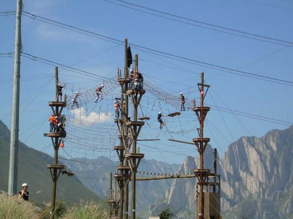 El Discovery del Centro Lanzate de la UDEM